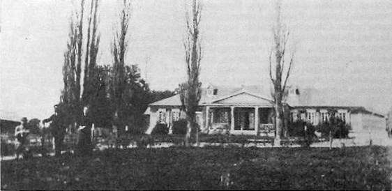 Беларуская (тарашкевіца): Цітва (Citva), сядзіба Янішэўскіх (Janišeŭski)